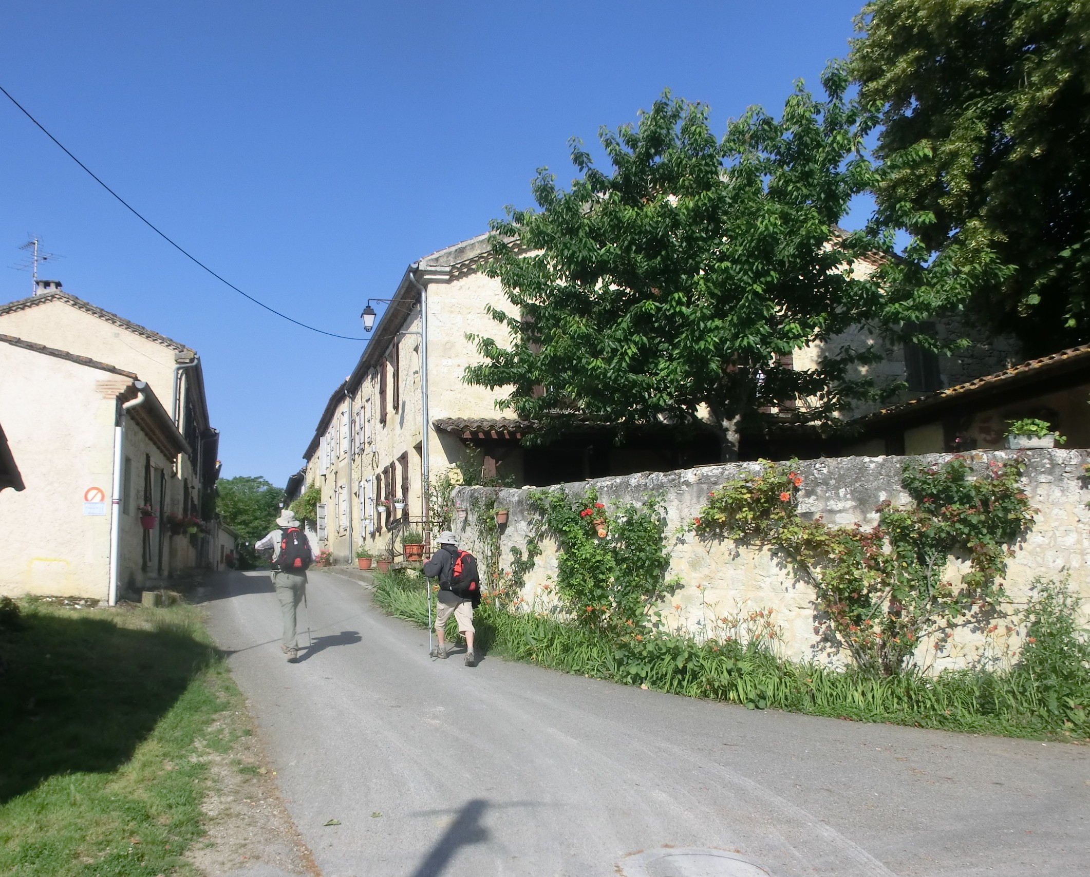 L'entrée du village